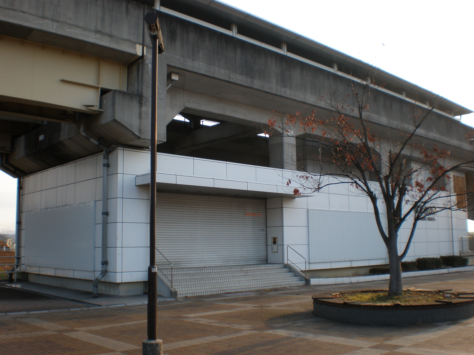 愛知県小牧市にある桃花台新交通桃花台線の桃花台東駅廃止後を撮影した。